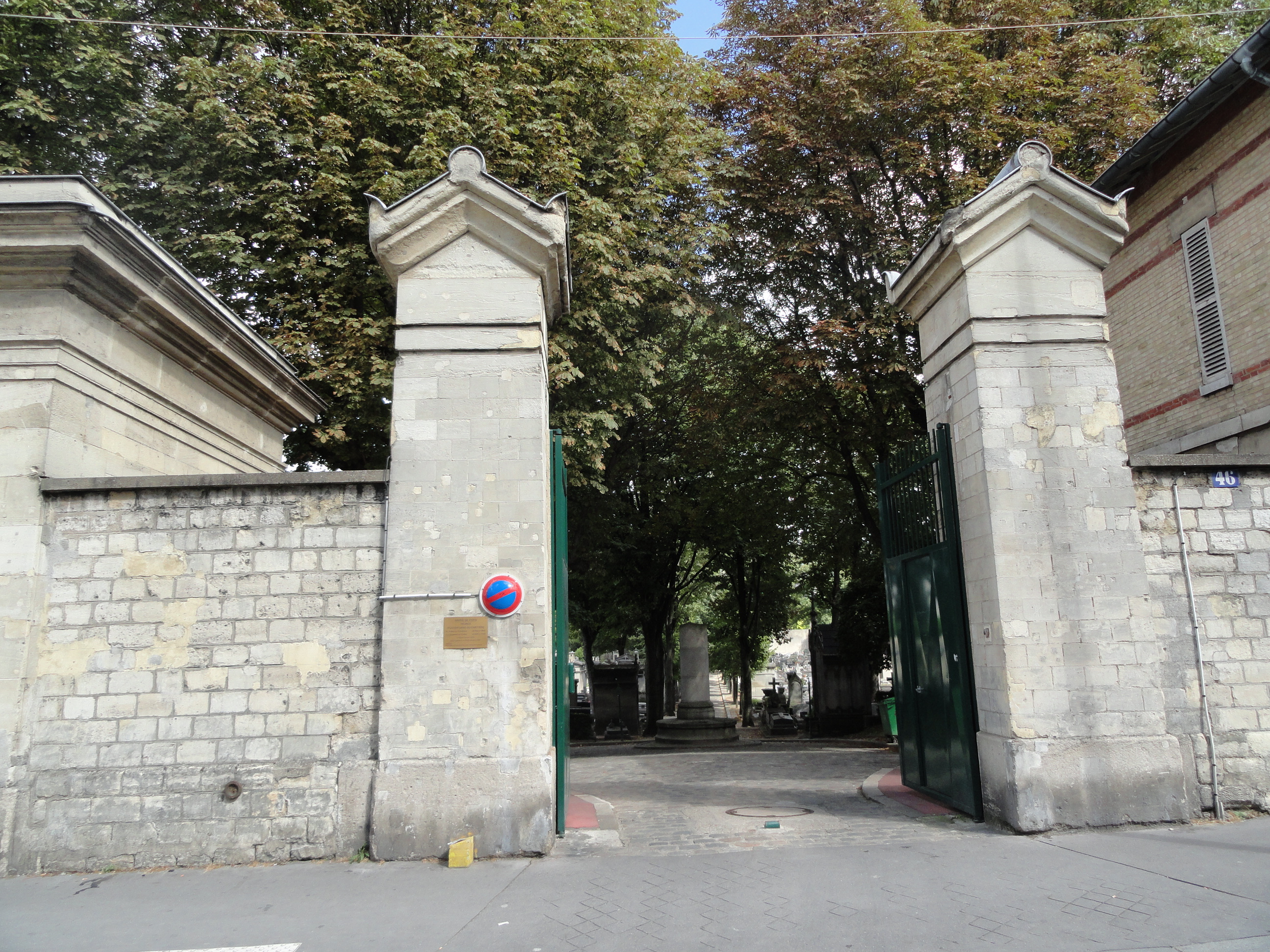 Cimetière de la Villette in Paris 19 - France - Main entrance